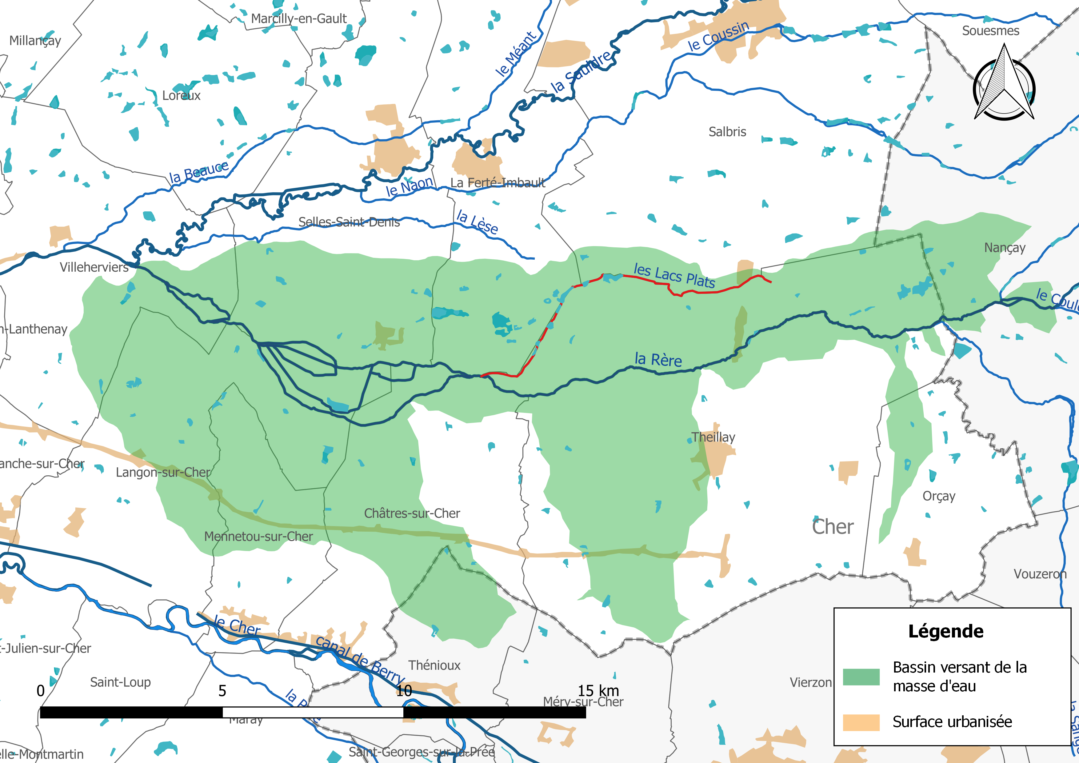 Carte de la masse d'eau FRGR0343 « la Rère » et de son bassin versant